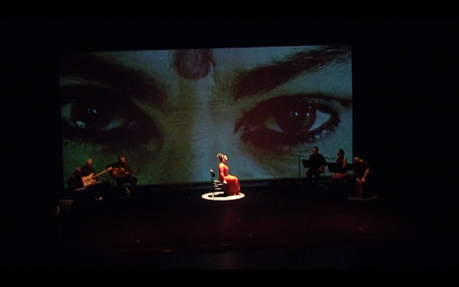 Representación de Carm€n en la Ciudad Alemana de Mainz en agosto de 2012